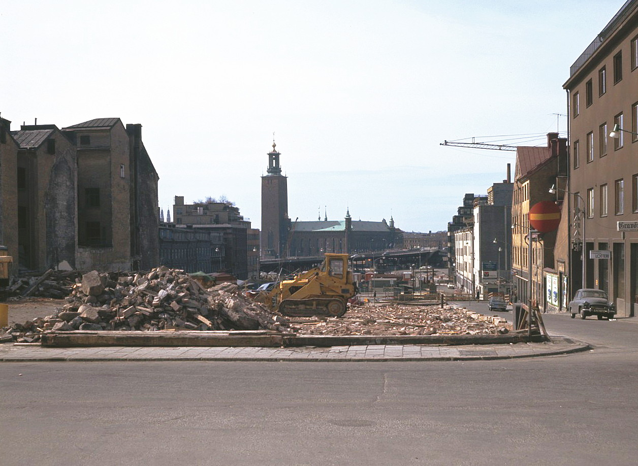 Kvarteret Elefanten i Stockholm, vy mot öst, Stadshuset i mitten och Vattugatan till höger